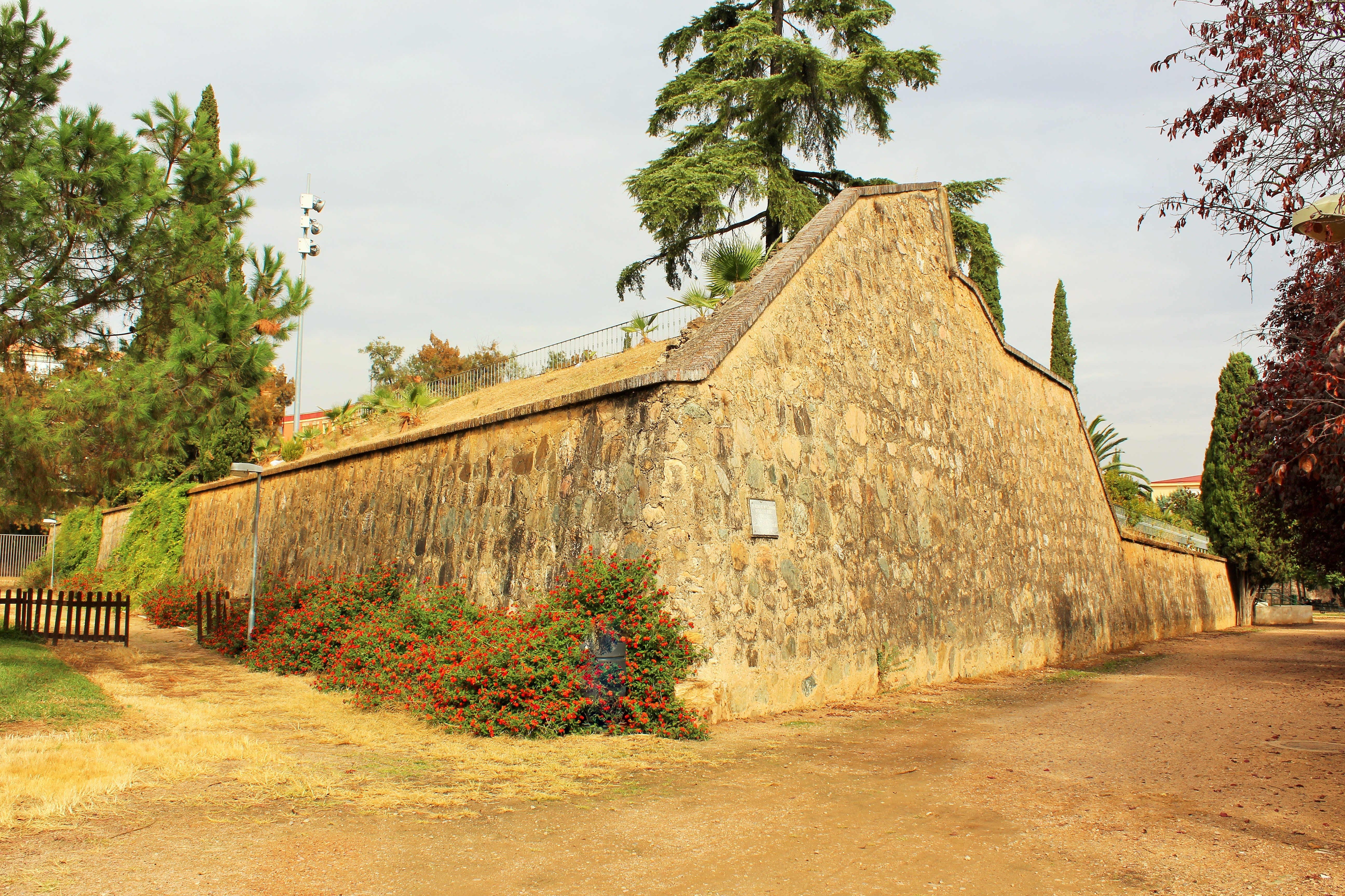 Lienzo paralelo a la muralla.